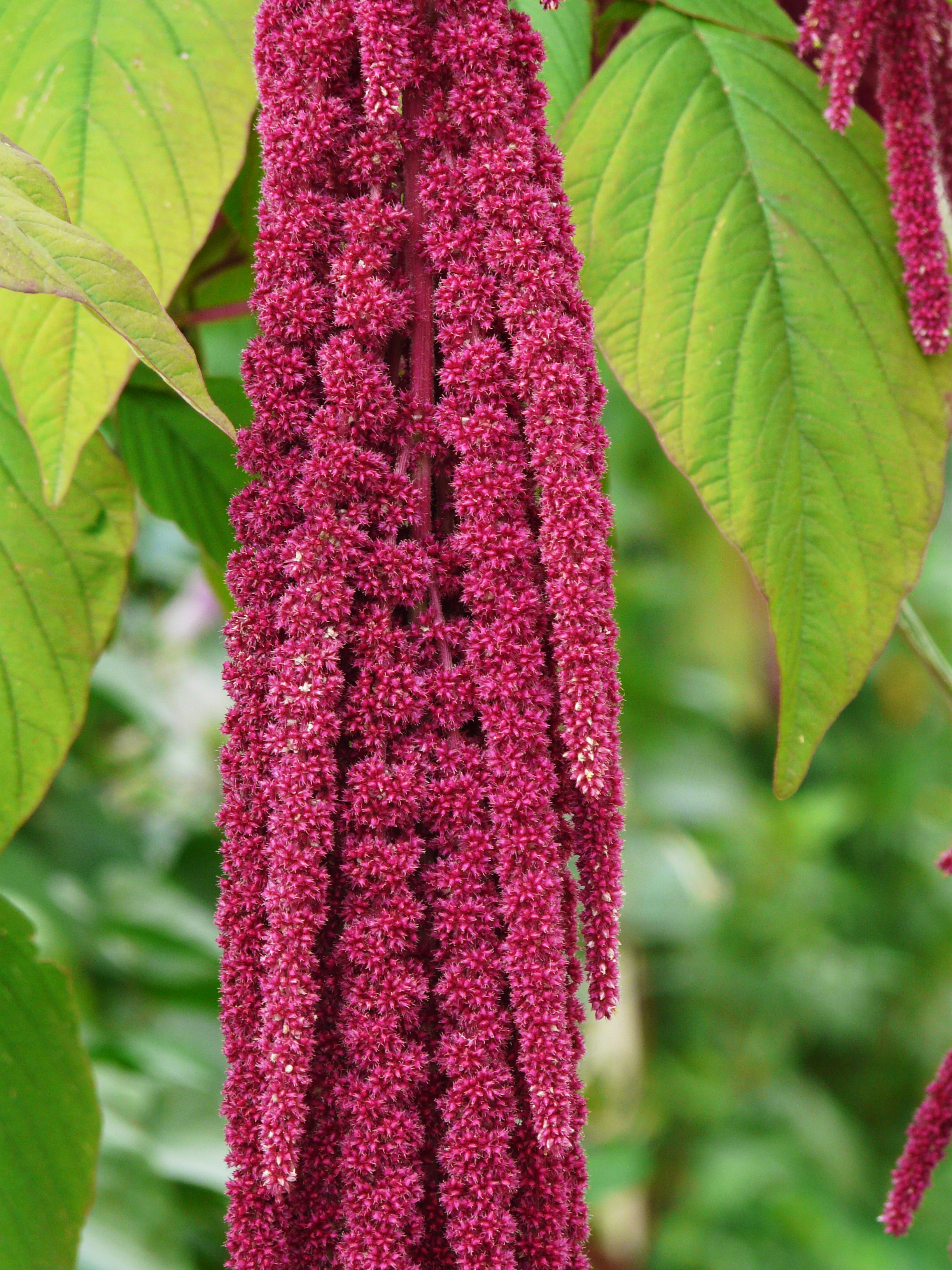 Inflorescences d'amarante queue de renard (Amaranthus caudatus), Dordogne, France.